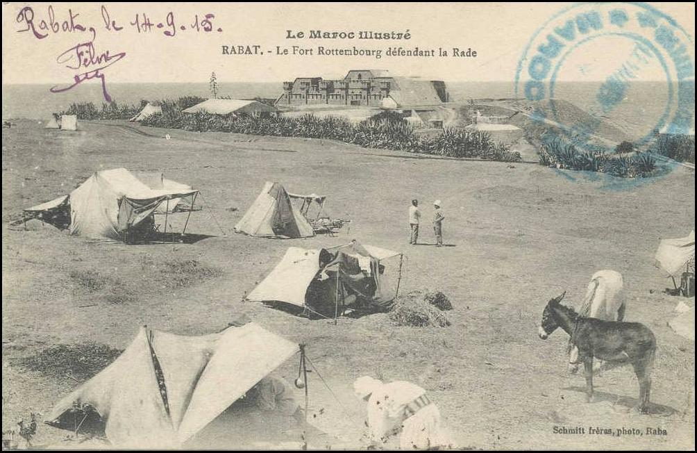 Carte postale datant de 1915 représentant un campement devant le Fort Hervé. Pub. Rabat, Maroc, 1915